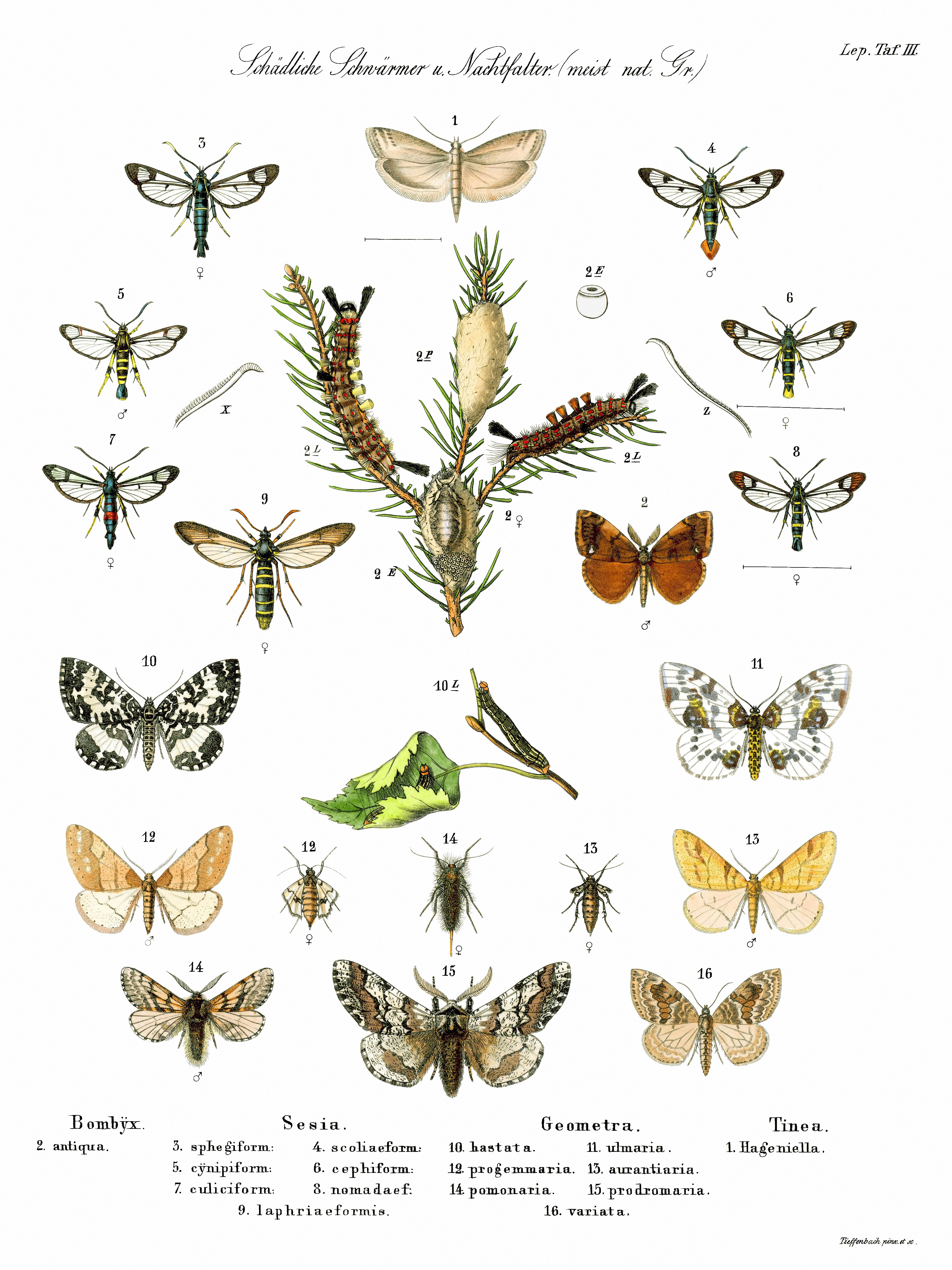 Paintings of some forest insects (butterflies) / Tafel mit einigen Forstinsekten (Schmetterlingen)